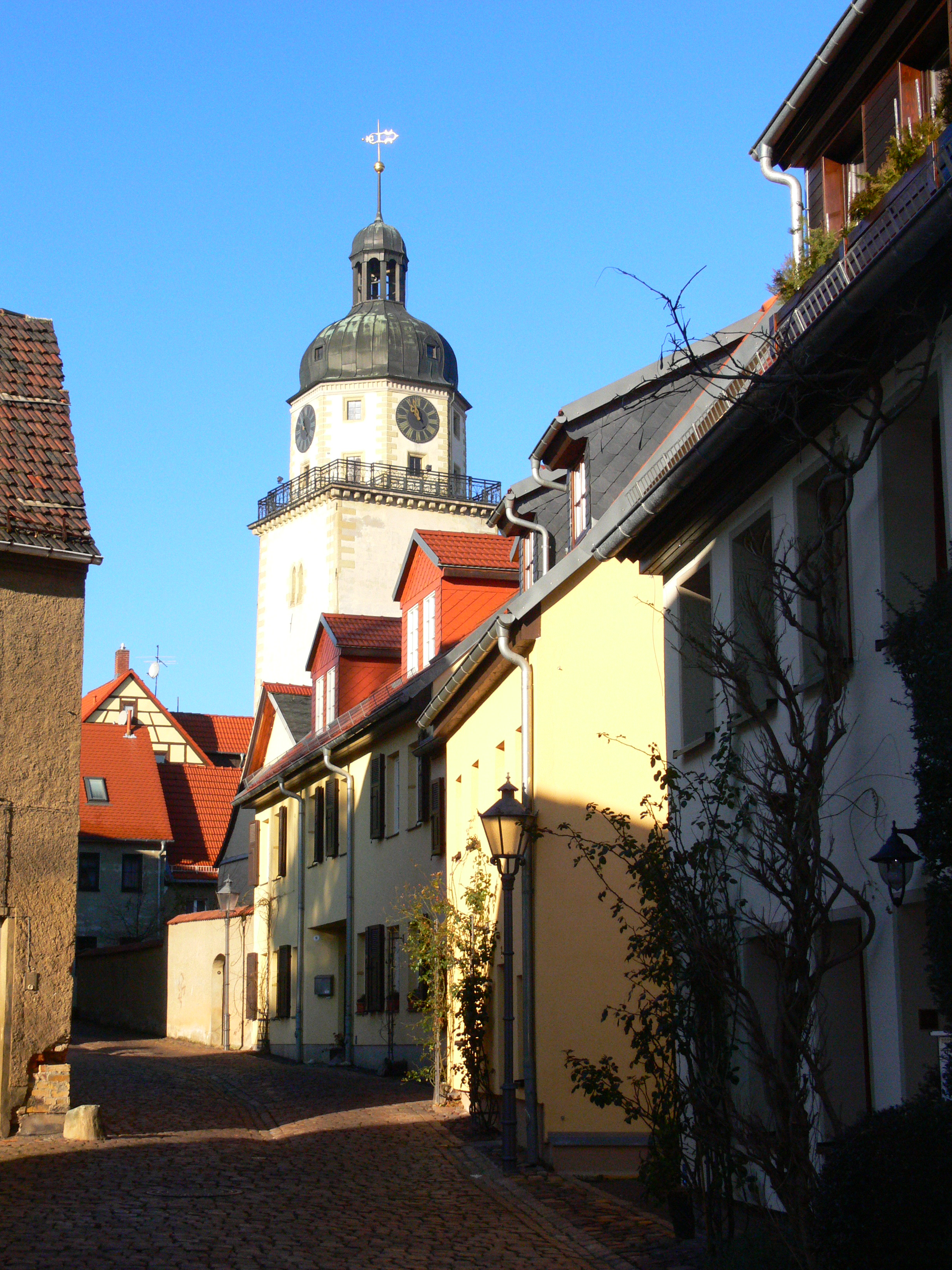 Blick in das Nikolaiviertel in Altenburg von der Dechanei aus